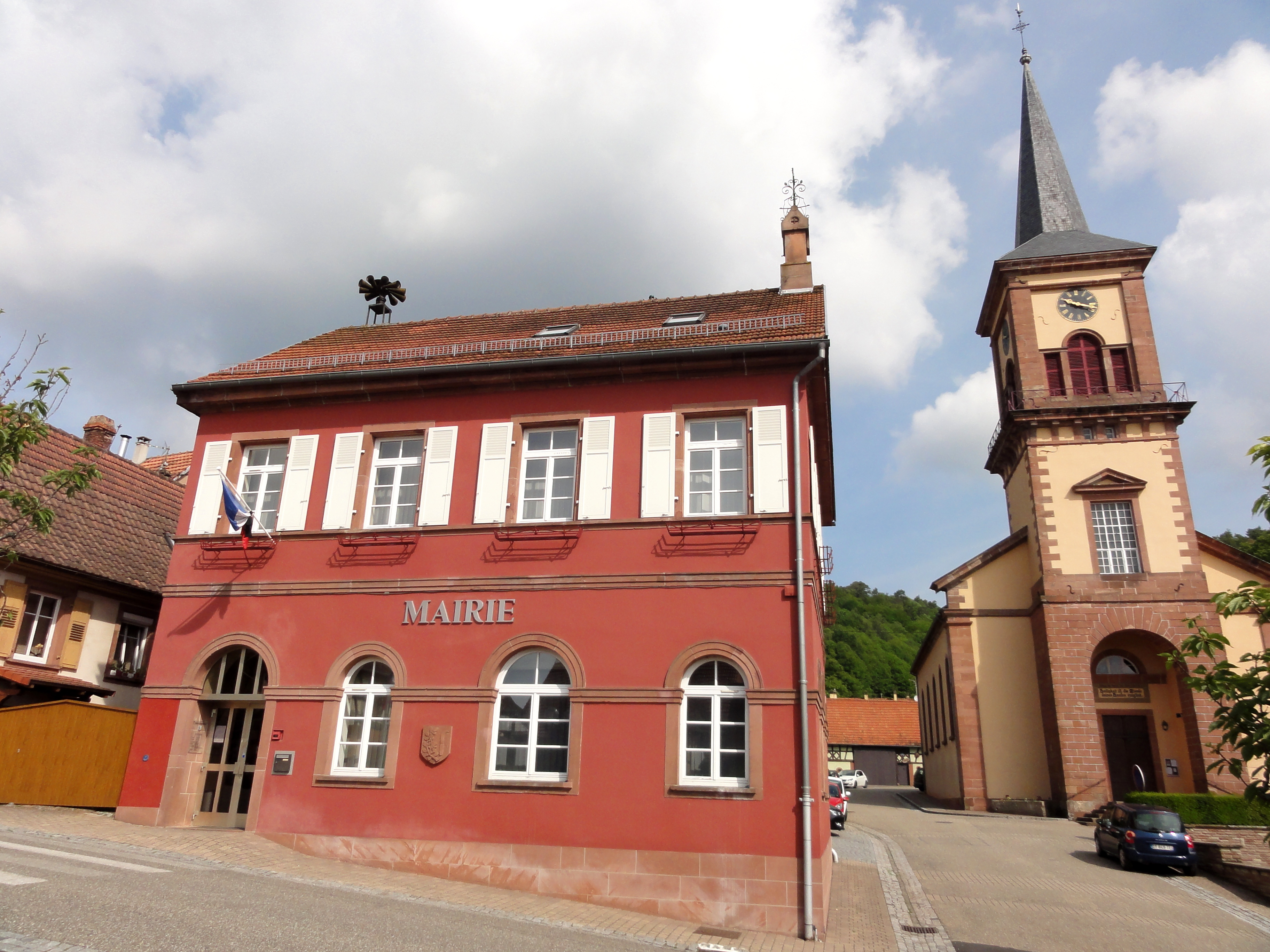 Alsace, Bas-Rhin, Offwiller, Mairie (XIXe), rue de la Libération. .